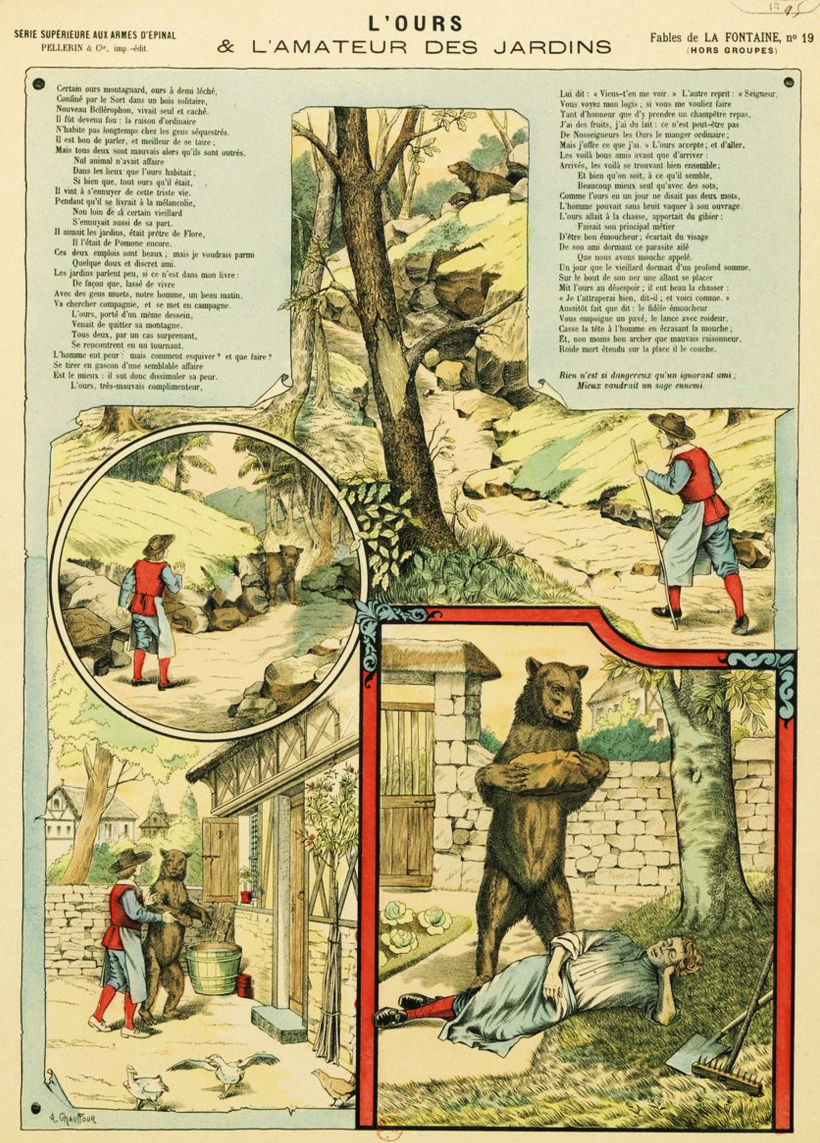 Estampe réalisée par E. Phosty représentant la fable L'Ours et l'Amateur des jardins de Jean de La Fontaine (Epinal, édition Pellerin & Cie, 1895).